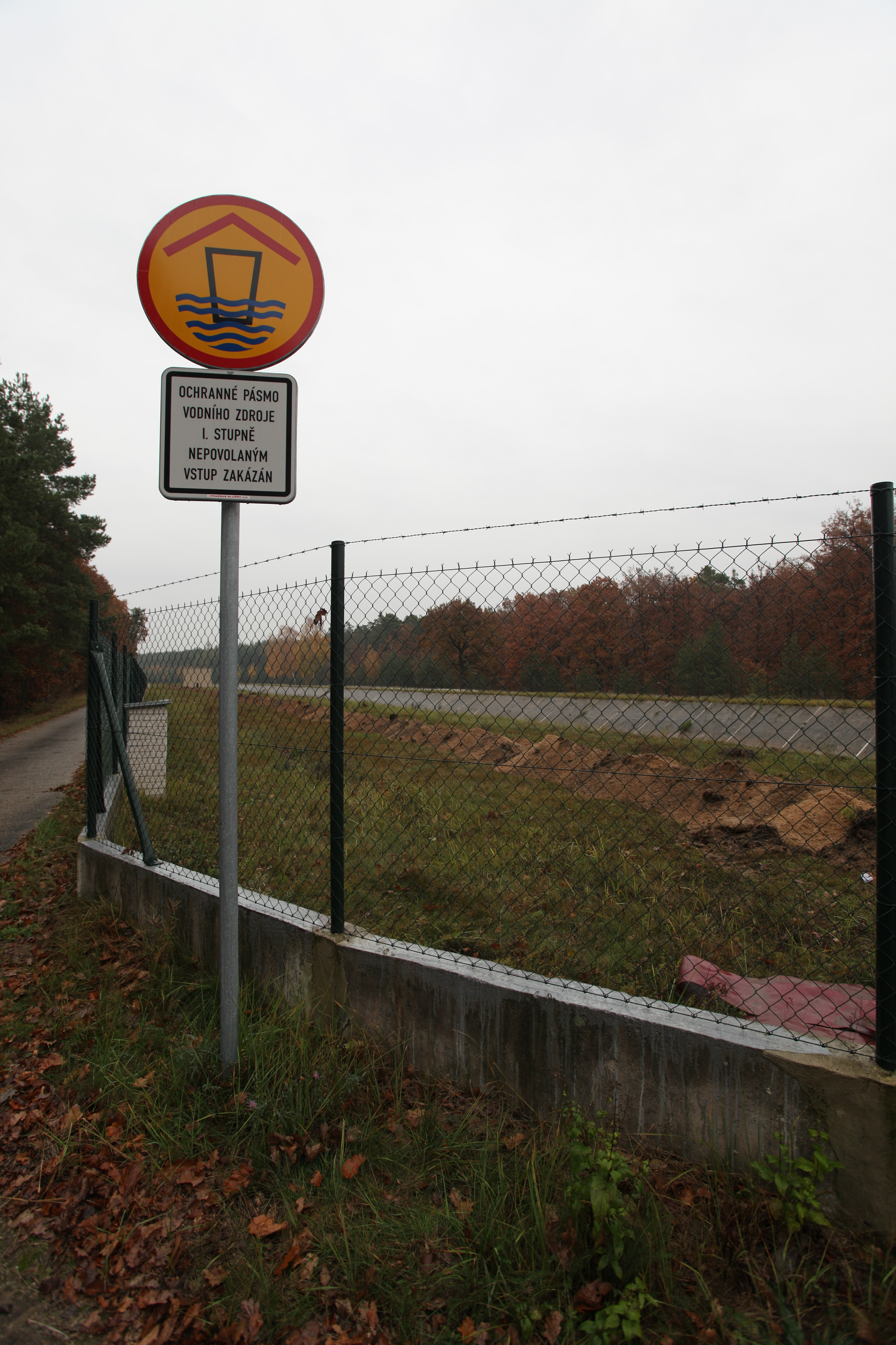 Vsakovací nádrže umělé infiltrace v úpravně vod v Káraném spadají do I. Stupně pásma hygienické ochrany vod. Zde dochází k zasakování upravené surové vody rychlofiltrací, která pochází z řeky Jizery. Voda zde zasakuje do přirozeného pískového podloží a tím se čistí. Po asi 40 dnech průstupem písky dosáhne sběrných studní, ze kterých je dopravována k další úpravě. Tento systém byl v Káraném zřízen v roce 1968. Každým rokem je třeba sebrat povrchovou vrstvu usazenin ze dna nádrže. Mocnost zdejších štěrkopísků je 8-12 m. Zdroje: Křivánek, Oldřich a Kněžek, Miroslav. 2001. Zdroje pitné vody v Káraném. Principy získávání vody v oblasti káranské vodárny. Pražské vodovody a kanalizace a.s.